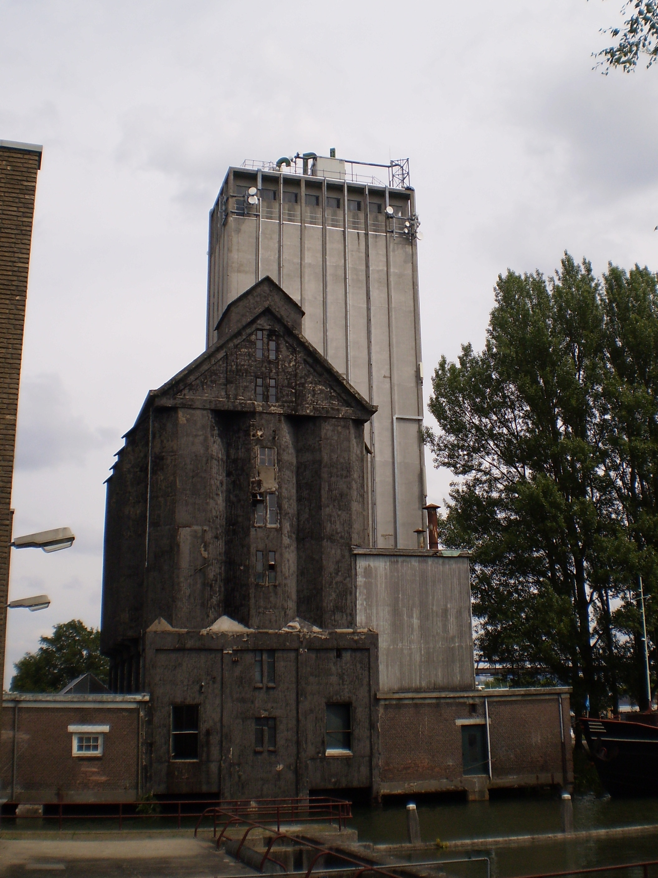 Silocomplex Coöperatieve Op- en Overslagvereniging W.A. "Combinatie Deventer-Lochem" (C.D.L.). Voor: "zwarte silo" (1924); achter: "grijze silo" (1961). Tot 1 april 2012 was in de zwarte silo de Stichting Industrieel Erfgoed Deventer gevestigd.